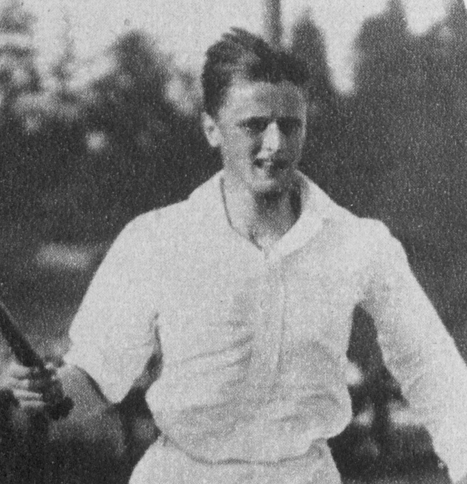 Henning Müller